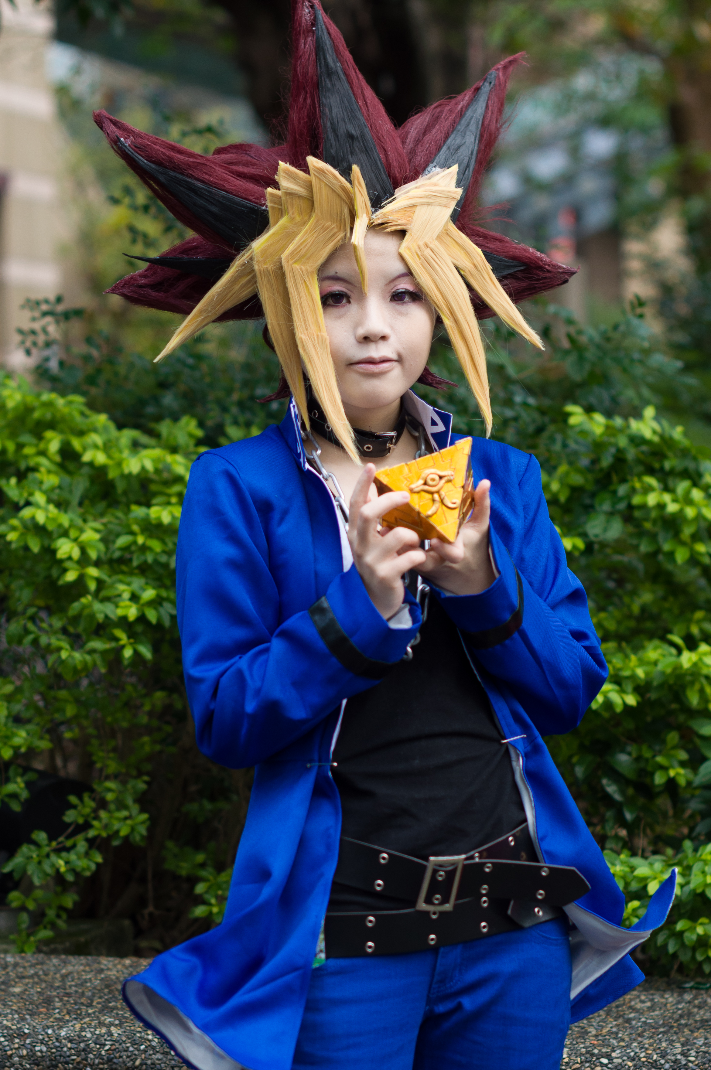 第44屆台灣同人誌販售會，《遊戲王》武藤遊戲cosplayer。